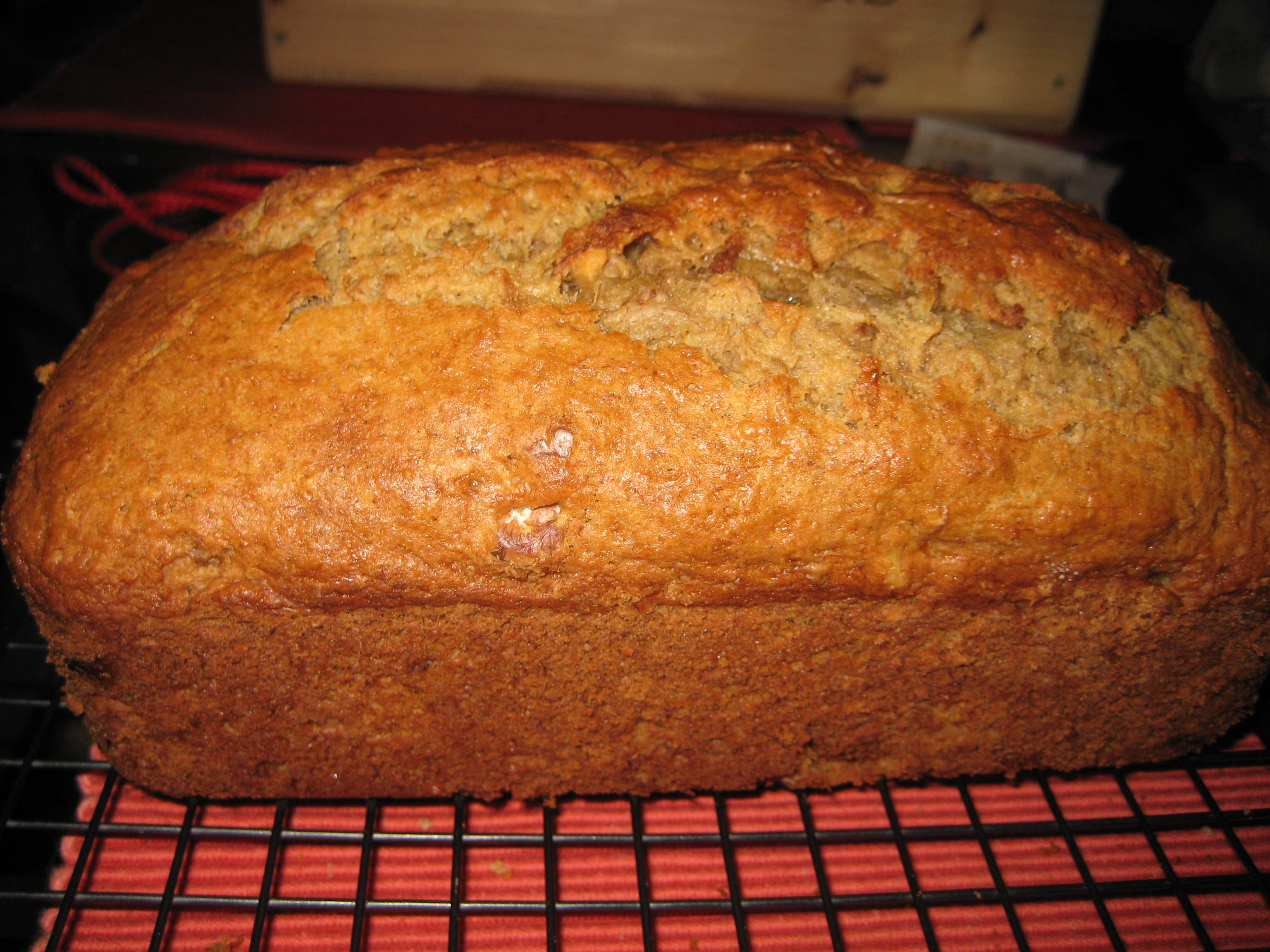 Banana bread loaf.